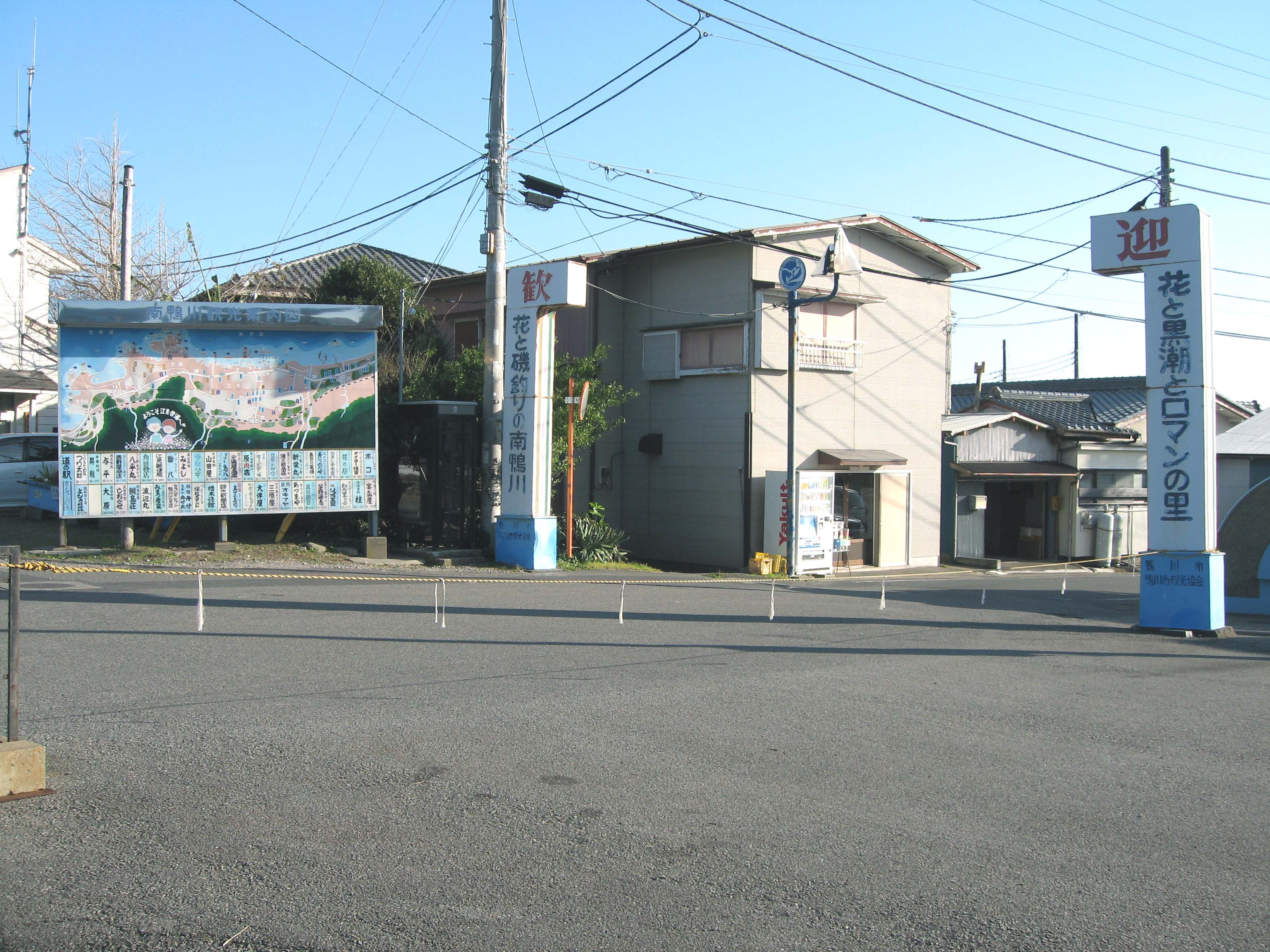 Emi station, Uchibo Line, Chiba, Japan, 江見駅駅前